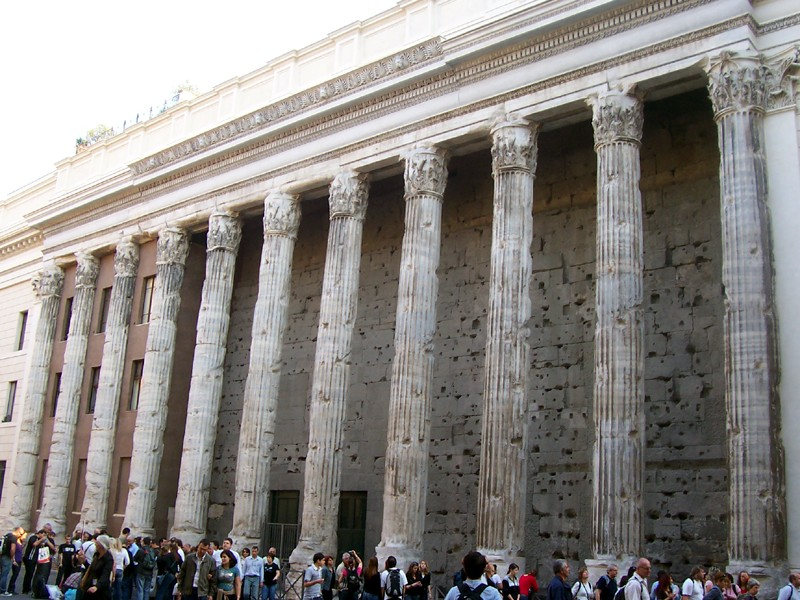 Roma - Palazzo della Borsa (Tempio di Adriano)